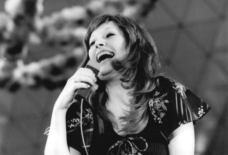 ADN-ZB Koard-28-4-76 Berlin: "Ball der Jugend" im Palast der Republik Frei nach Wunsch und Programmheft konnten die Gäste des Balles der Jugend am 28.4.76 im Palast der Republik ihren Lieblingstitel und ihren Interpreten wählen. Zu den auftretenden Künstlern aus dem In- und Ausland gehörte auch Alla Pugatschowa aus der UdSSR. (Foto von der Generalprobe)